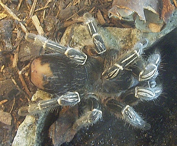 Aphonopelma seemannii